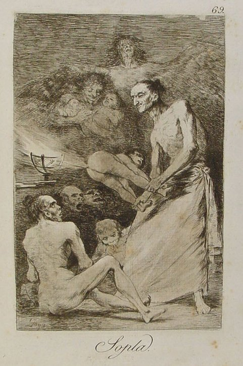 Capricho nº 69: Sopla de Goya, serie Los Caprichos